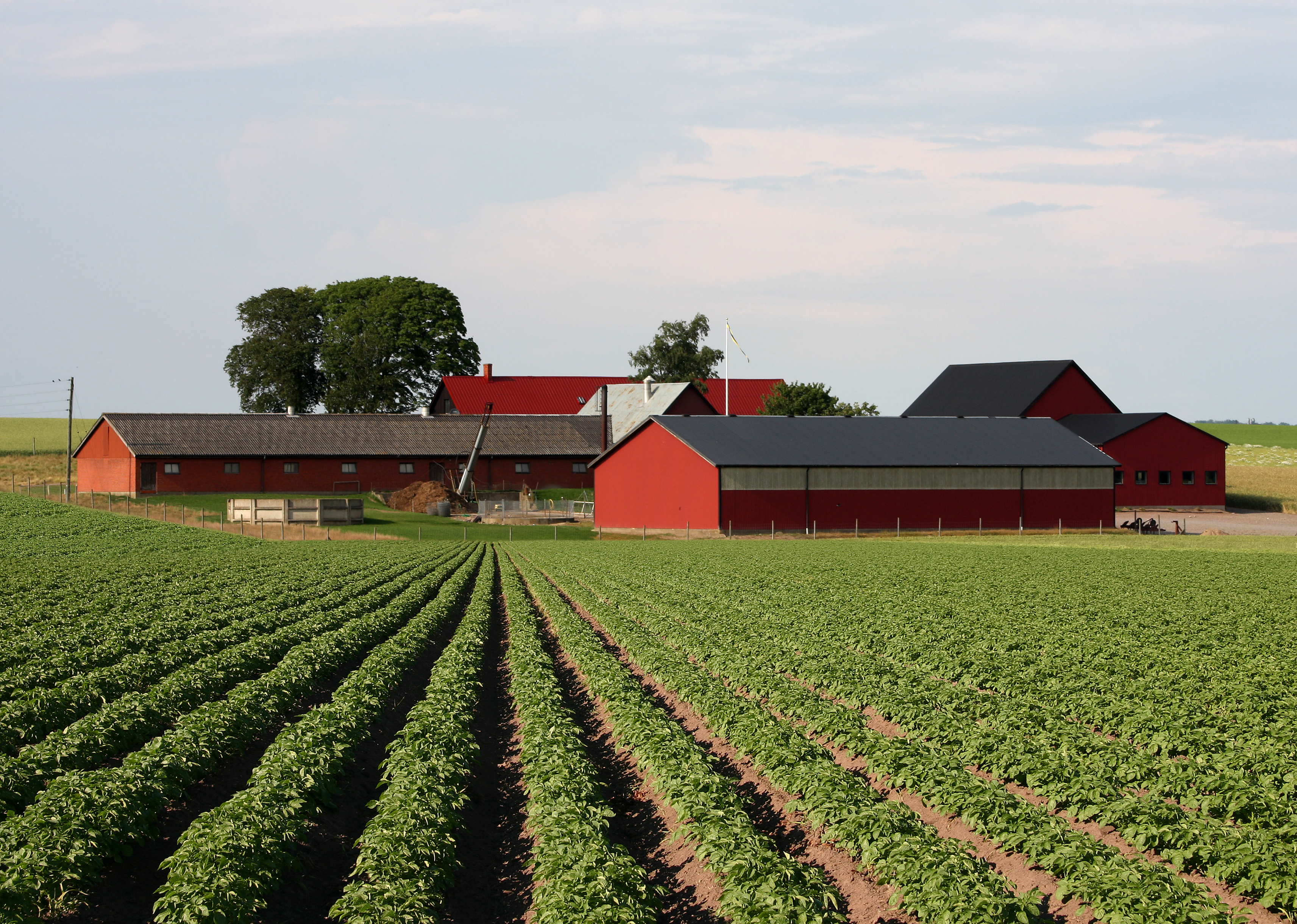 Farm in Schweden.